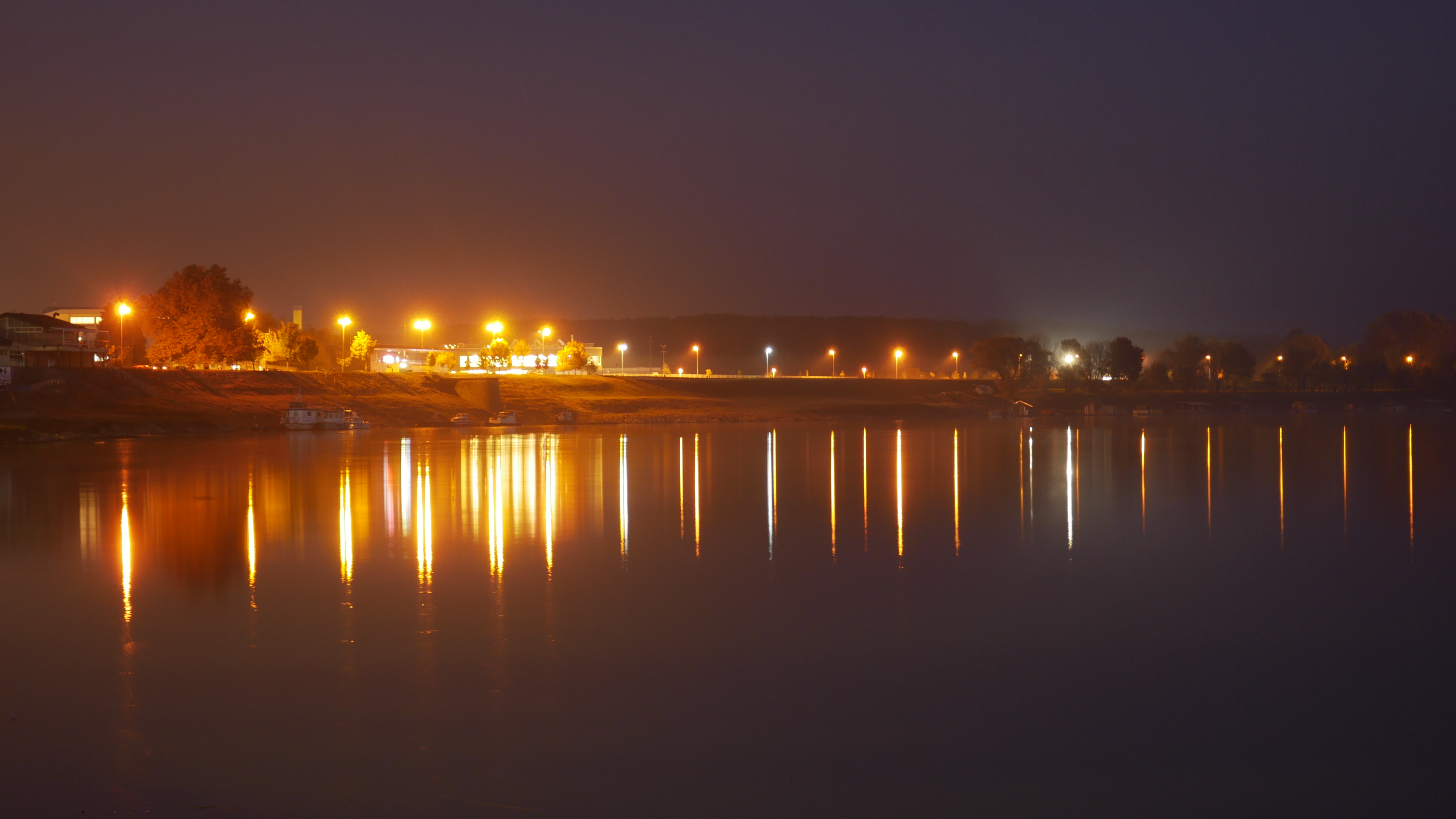 Drugi dio šetnice uz Savu prema Slavonskom Brodu